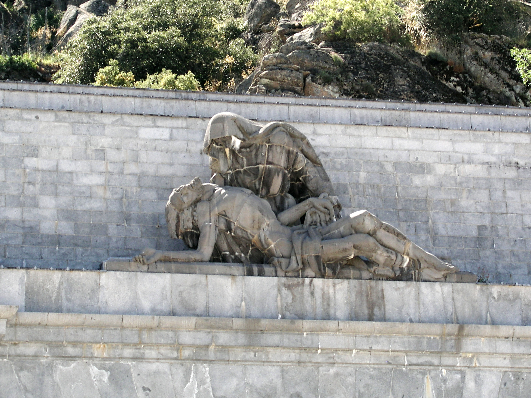 Valle de Los Caidos, Madrid, Spain. Statue "La Piedad" by Juan Ávalos, at entrance.